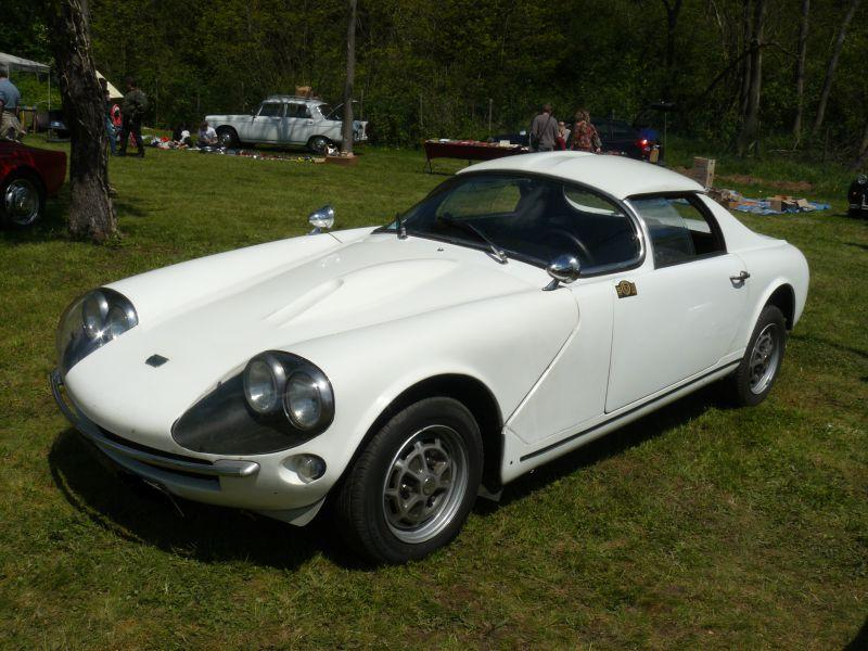 Photo prise à Chelle le 1er Mai 2012